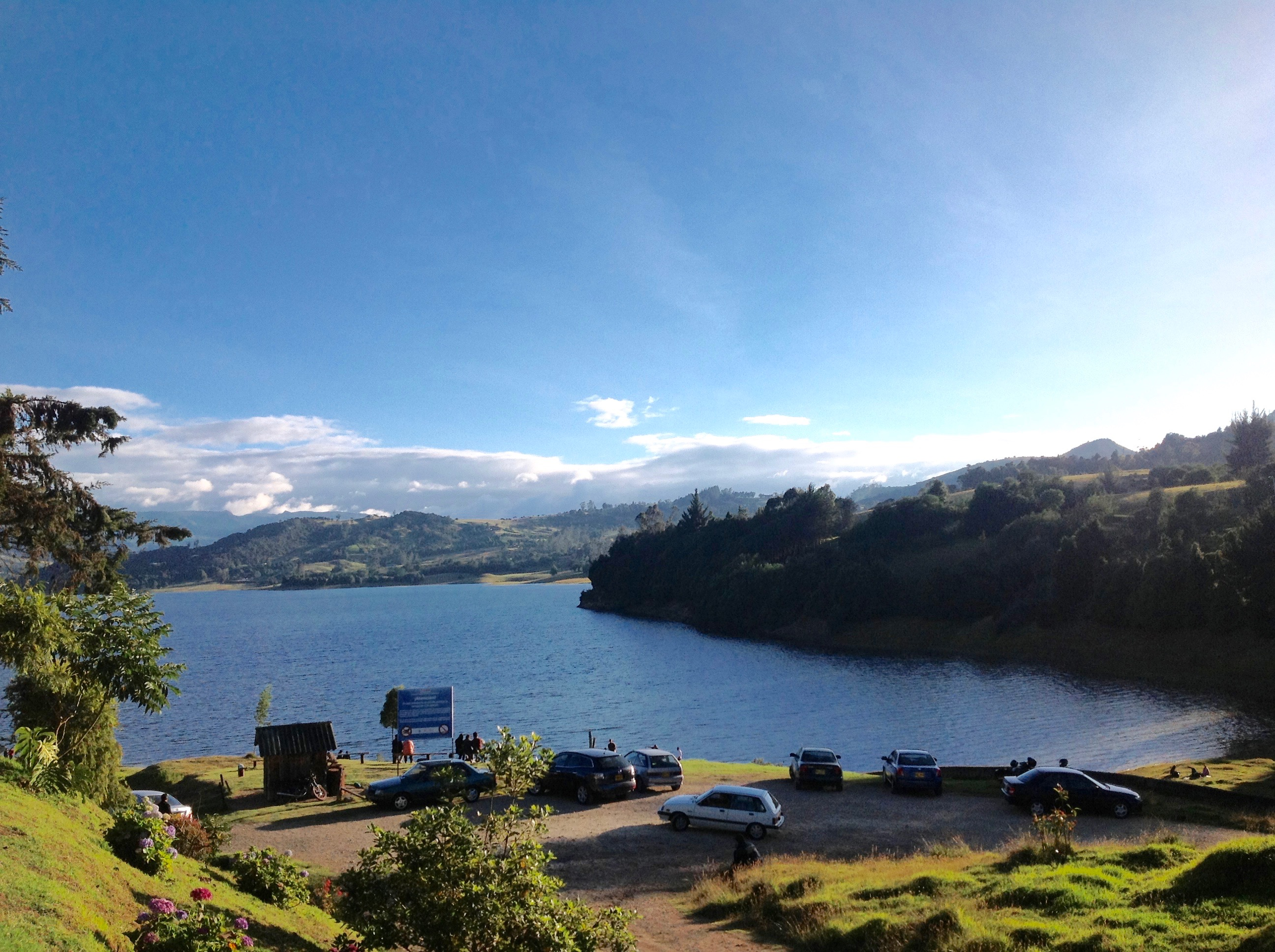 Esta fotografía fue tomada en el municipio colombiano con código 25183.